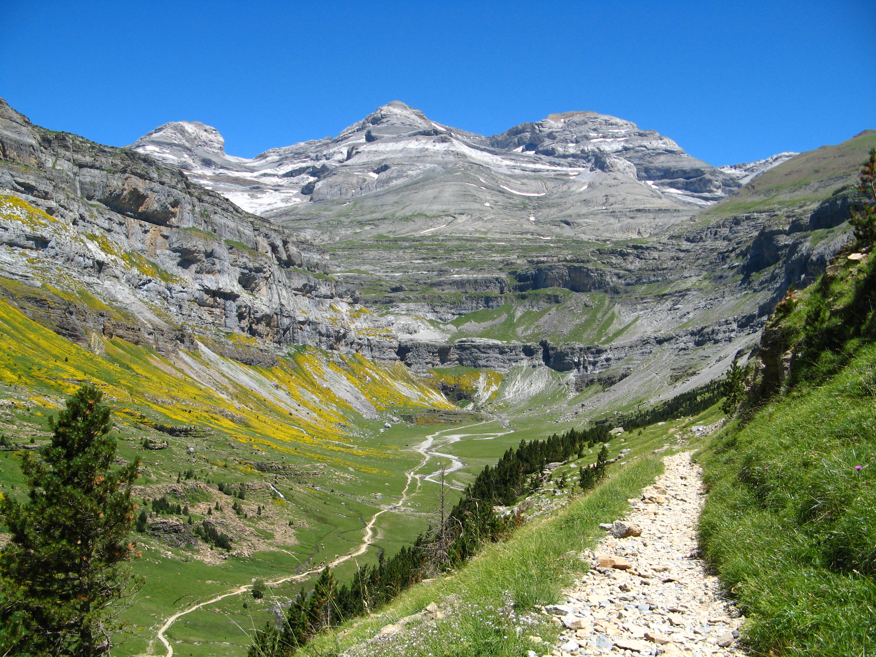 Cirque de Soaso et massif du Mont-Perdu, dans la vallée d'Ordesa (Espagne)